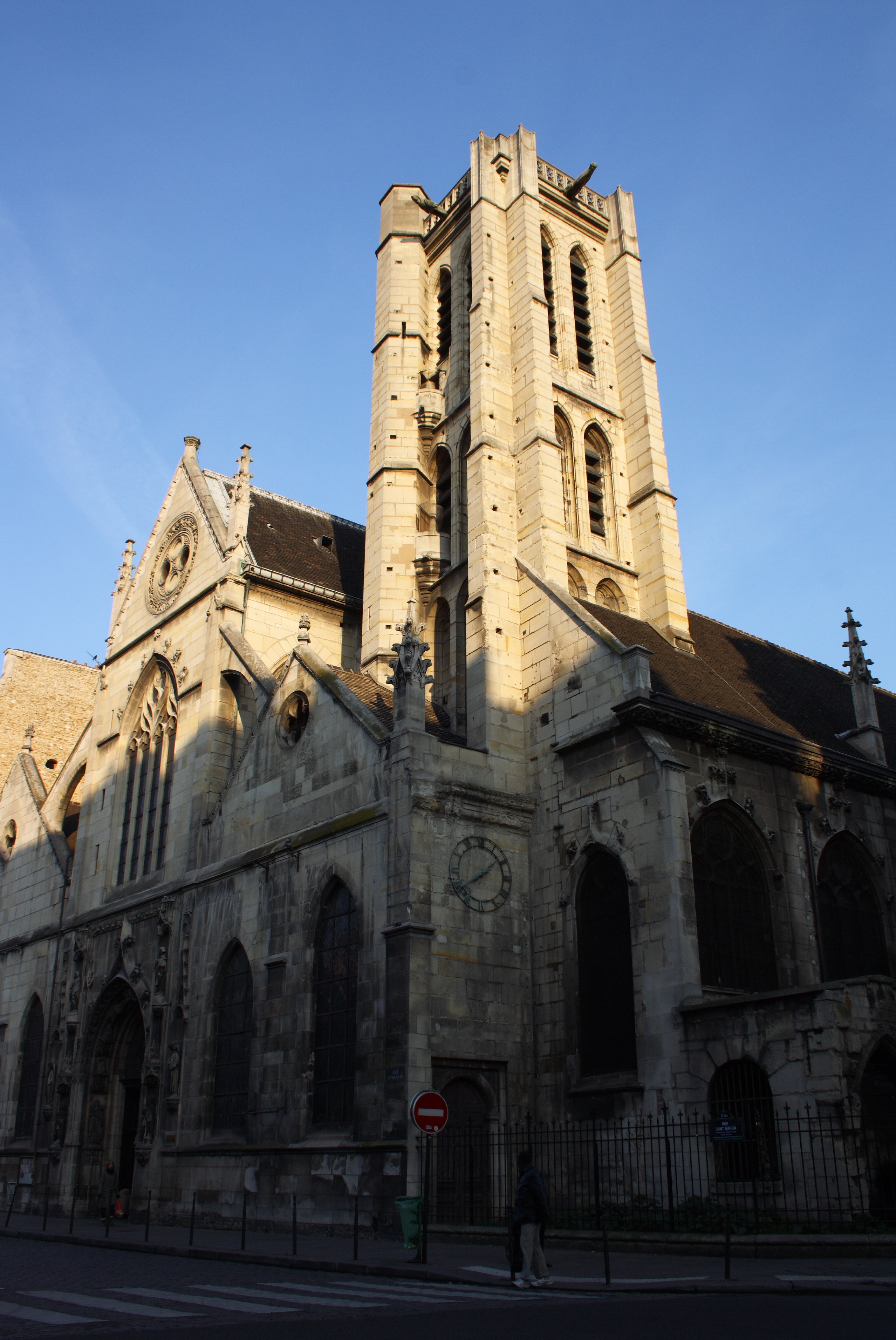 Katholische Pfarrkirche Saint-Nicolas-des-Champs im 3. Arrondissement von Paris